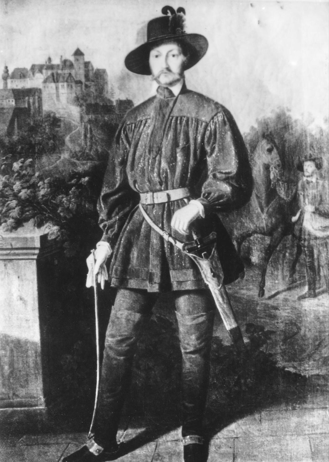 Carl Prinz zu Solms-Braunfels (1812-1875) vor Schloss Braunfels andere Versionen: ...